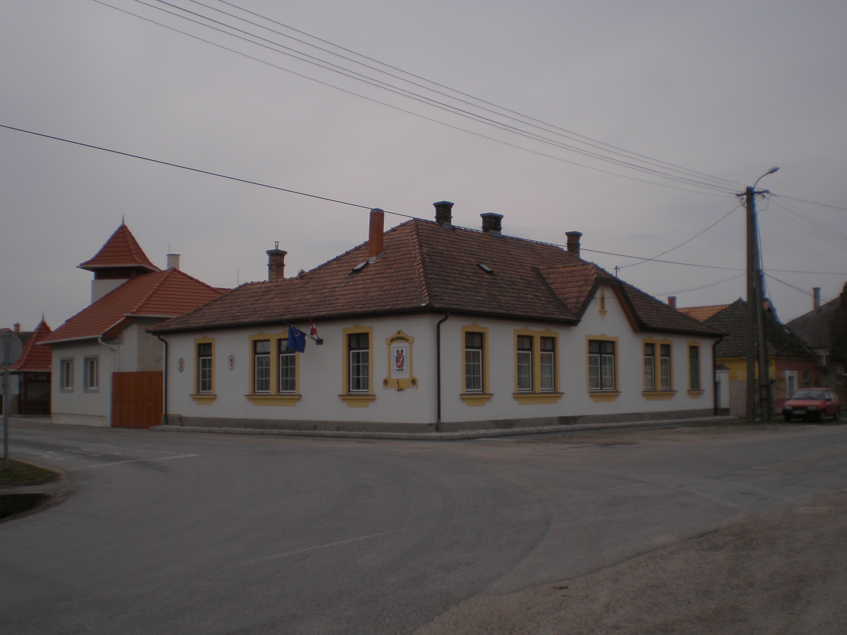 Községháza (Mecsér, Győr-Moson-Sopron megye, Magyarország)